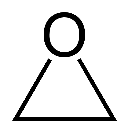 Skeletal formula of ethylene oxide